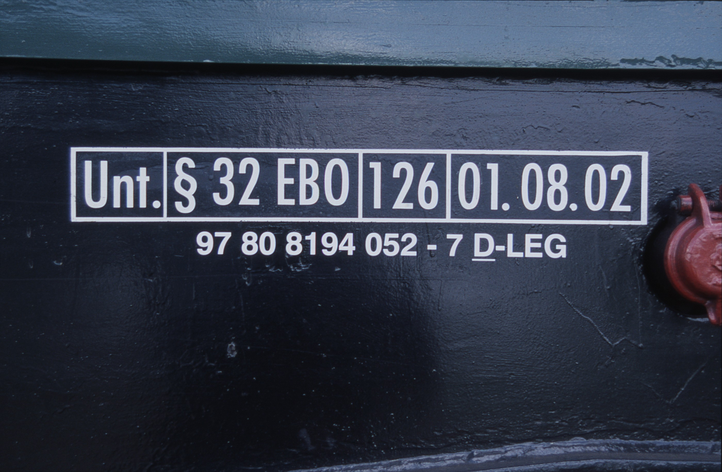 Betriebsnummer der 194 052-7 ab 2007